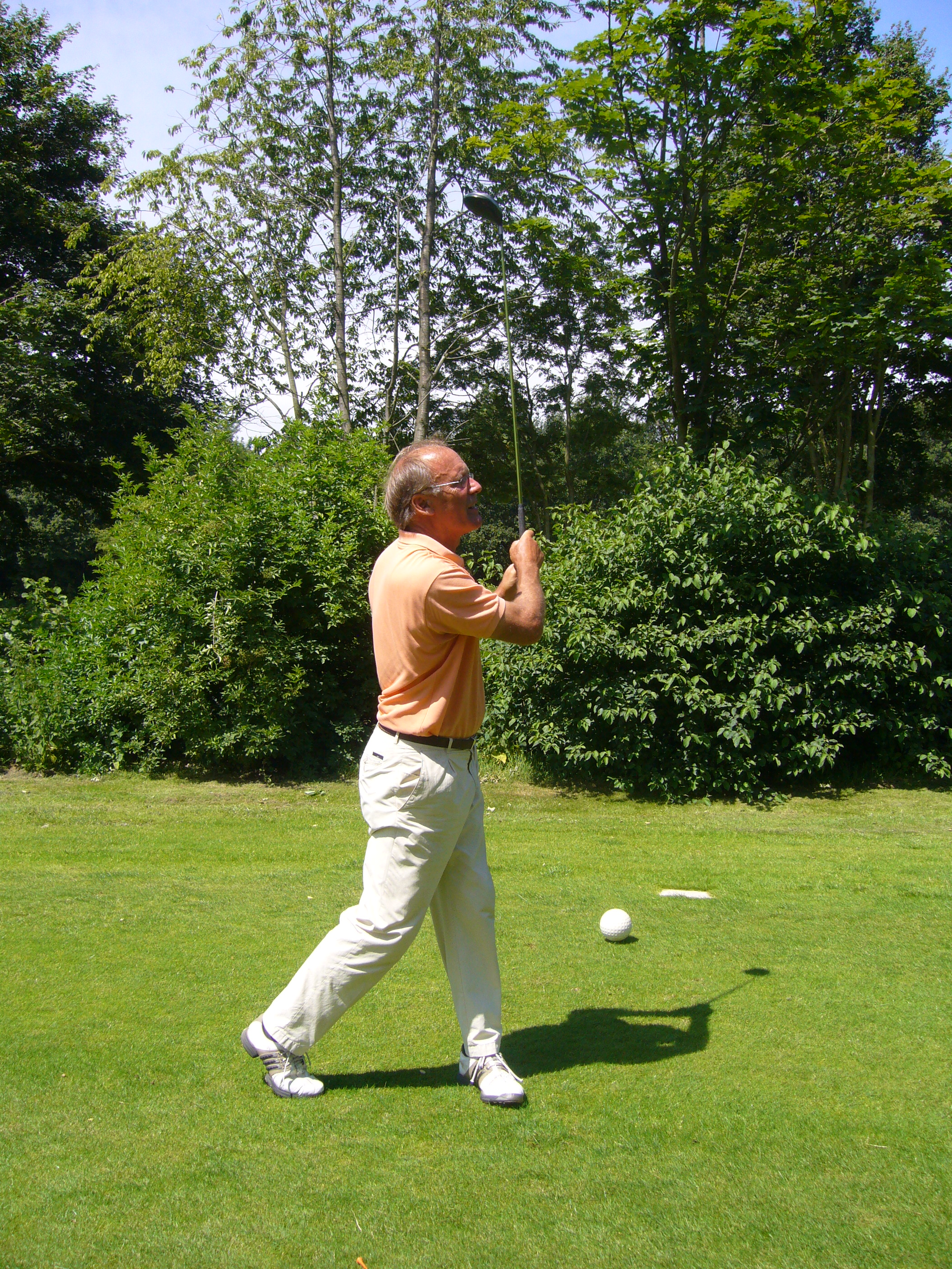 Ron Popma, Nederlands international squash & atletiek